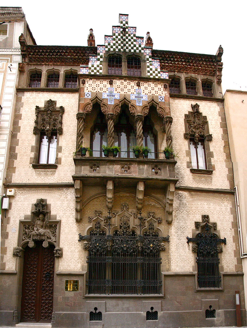 Casa Coll i Regas (Mataró-Maresme-Catalunya), obra de Josep Puig i Cadafalch, 1898. Les escultures són d'Eusebi Arnau.